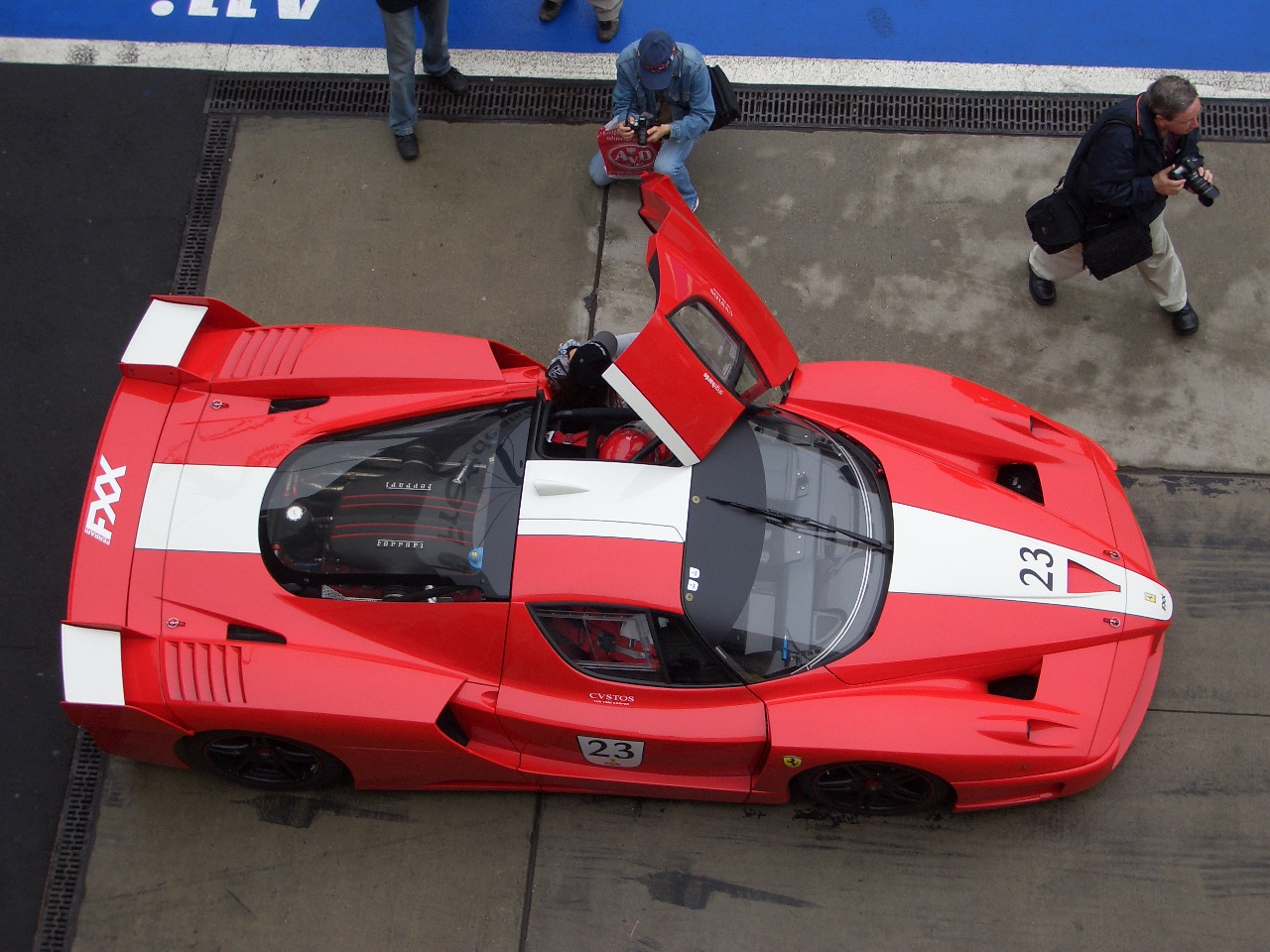 Ferrari-Racing-Day`s 2006, Nürburgring, 03.09.2006. FXX-Box.